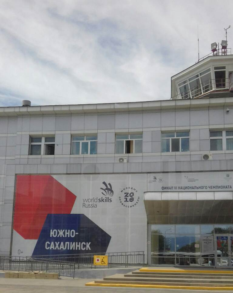 At the main entrance to the airport building